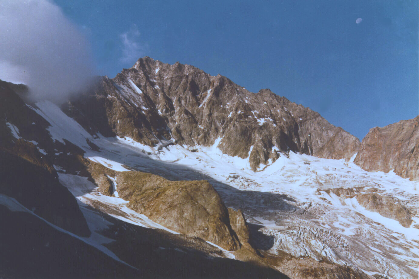 Großer Löffler von Osten mit dem Löfflerkees, Zillertaler Alpen